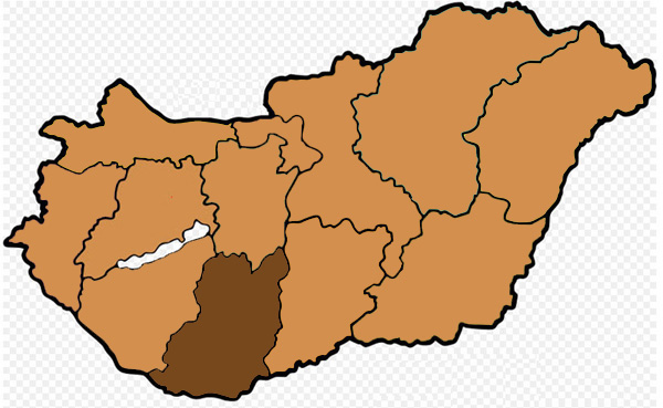 Mappa dell'arcidiocesi cattolica di Pecs, in Ungheria. Lavoro personale eseguito da questa immagine di Commons.